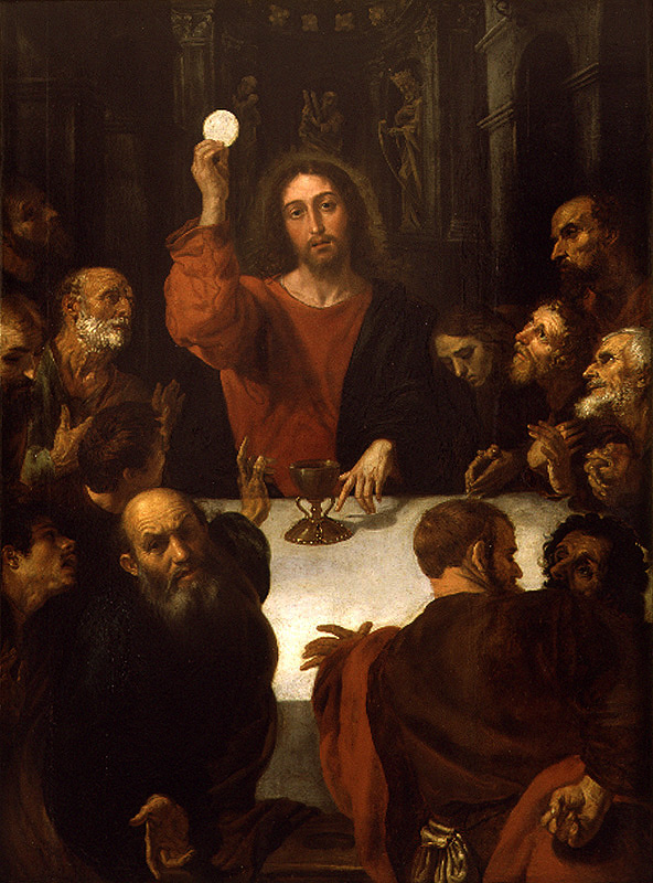 La obra representa la Última Cena, en la que Jesucristo cenó por última vez con sus apóstoles y durante la que instituyó el sacramento de la eucaristía.